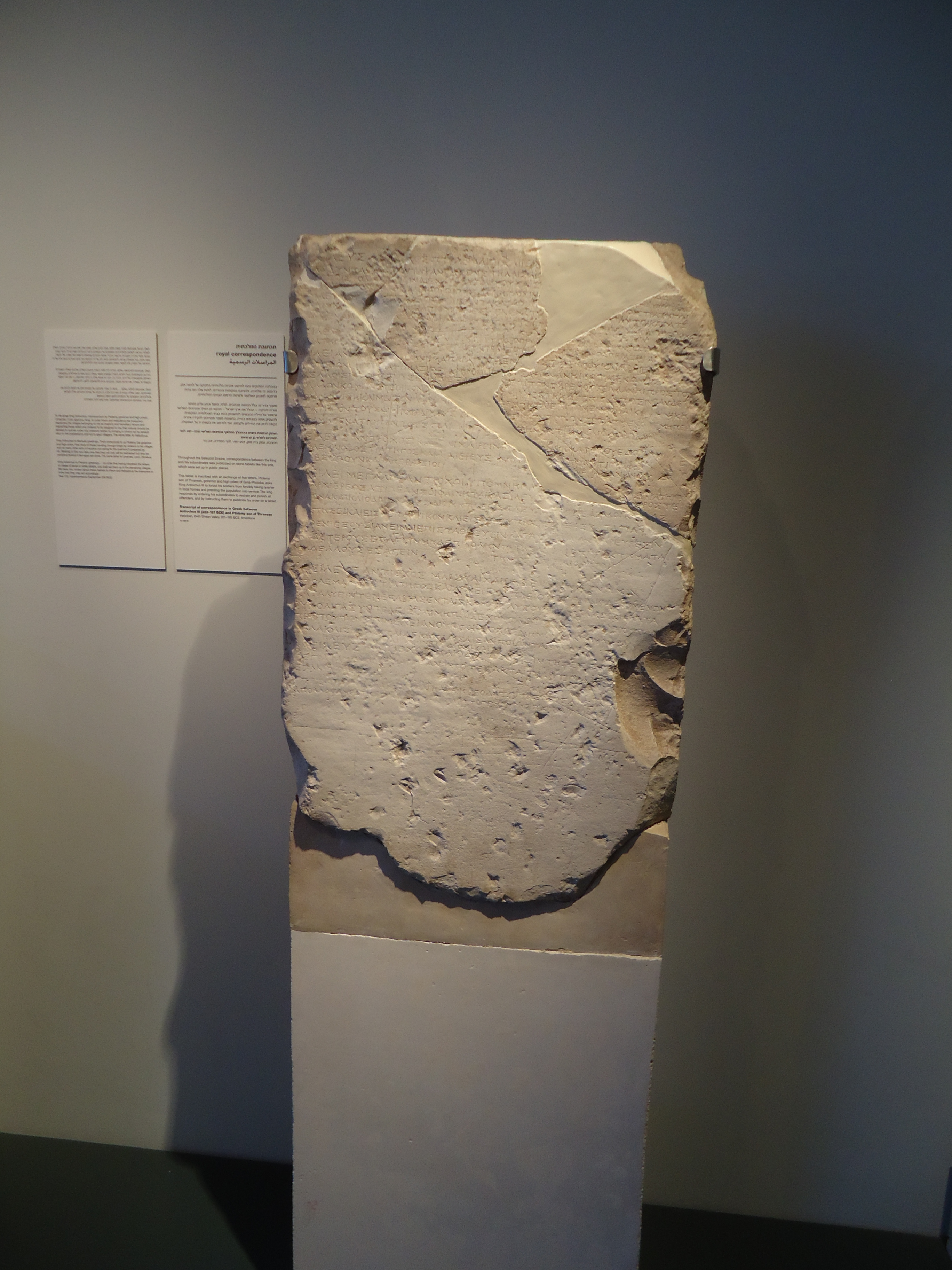 כתובת חפציבה היא כתובת רשמית בשפה היוונית העתיקה, המתוארכת לסביבות 195 לפנה"ס